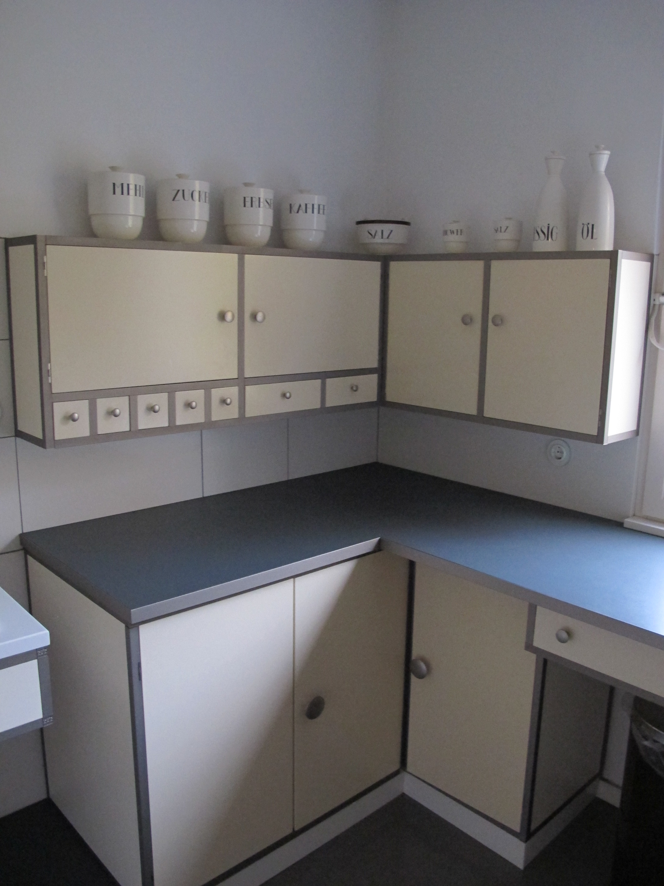 Haus am Horn, interior, küche